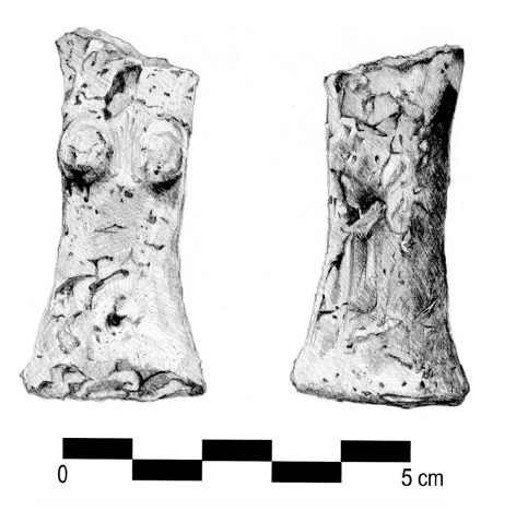 Figura ginecomorfa en arcilla procedente de un nivel postdeposicional (US2A) de la Estructura 13 del poblado calcolítico “Venta del Rapa” (Mancha Real, Jaén).